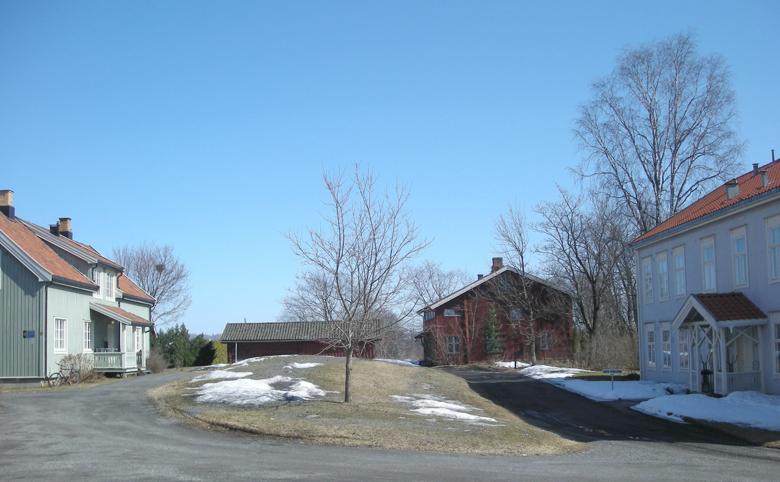 Disengården på Hamar, der Jernbanemuseet var frem til 1956.